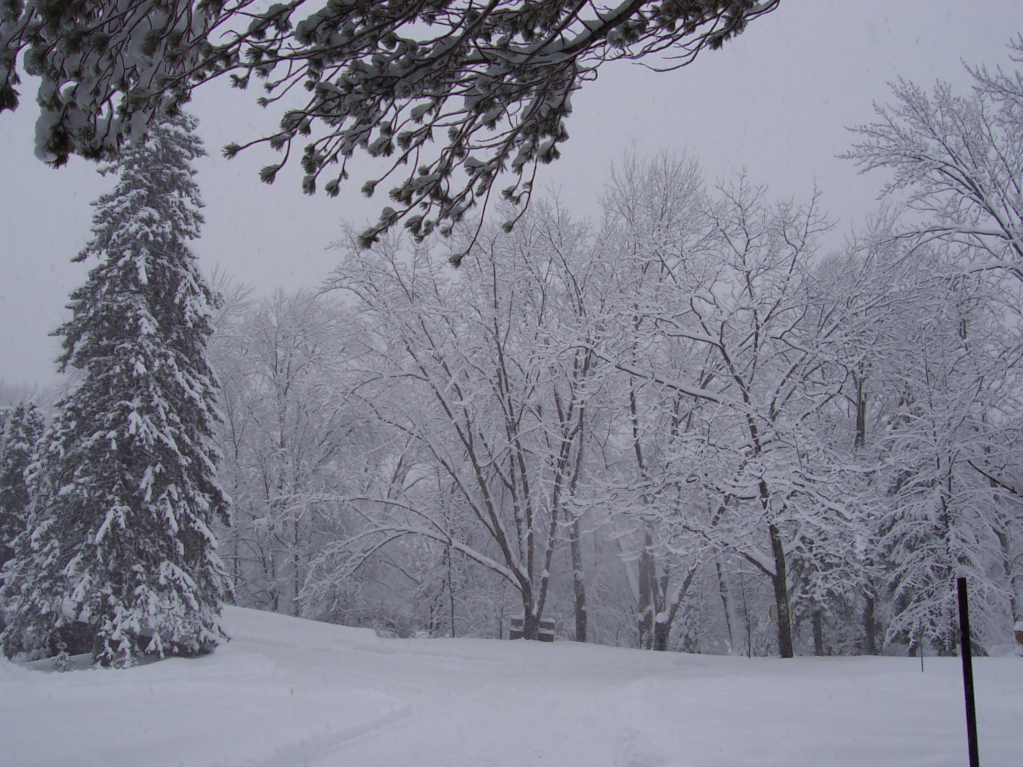 Scène d'hiver au Jardin zoologique du Québec. Winter scene at the Quebec zoological garden. Photo par/taken by User:Boréal